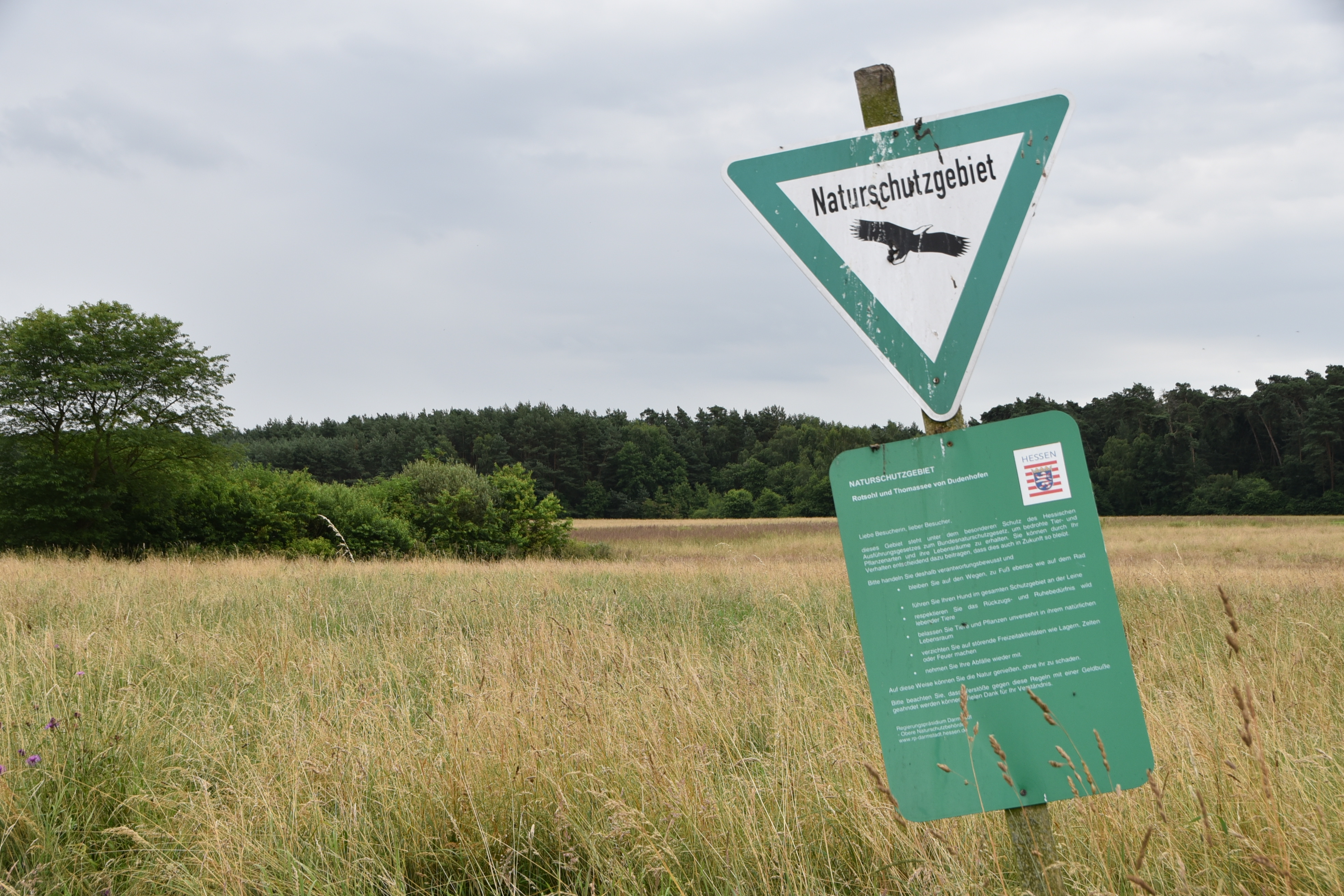 Hinweisschild NSG Rotsohl und Thomassee von Dudenhofen